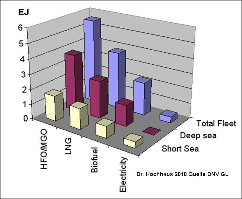 Energieverbrauch der Schifffahrt 2050